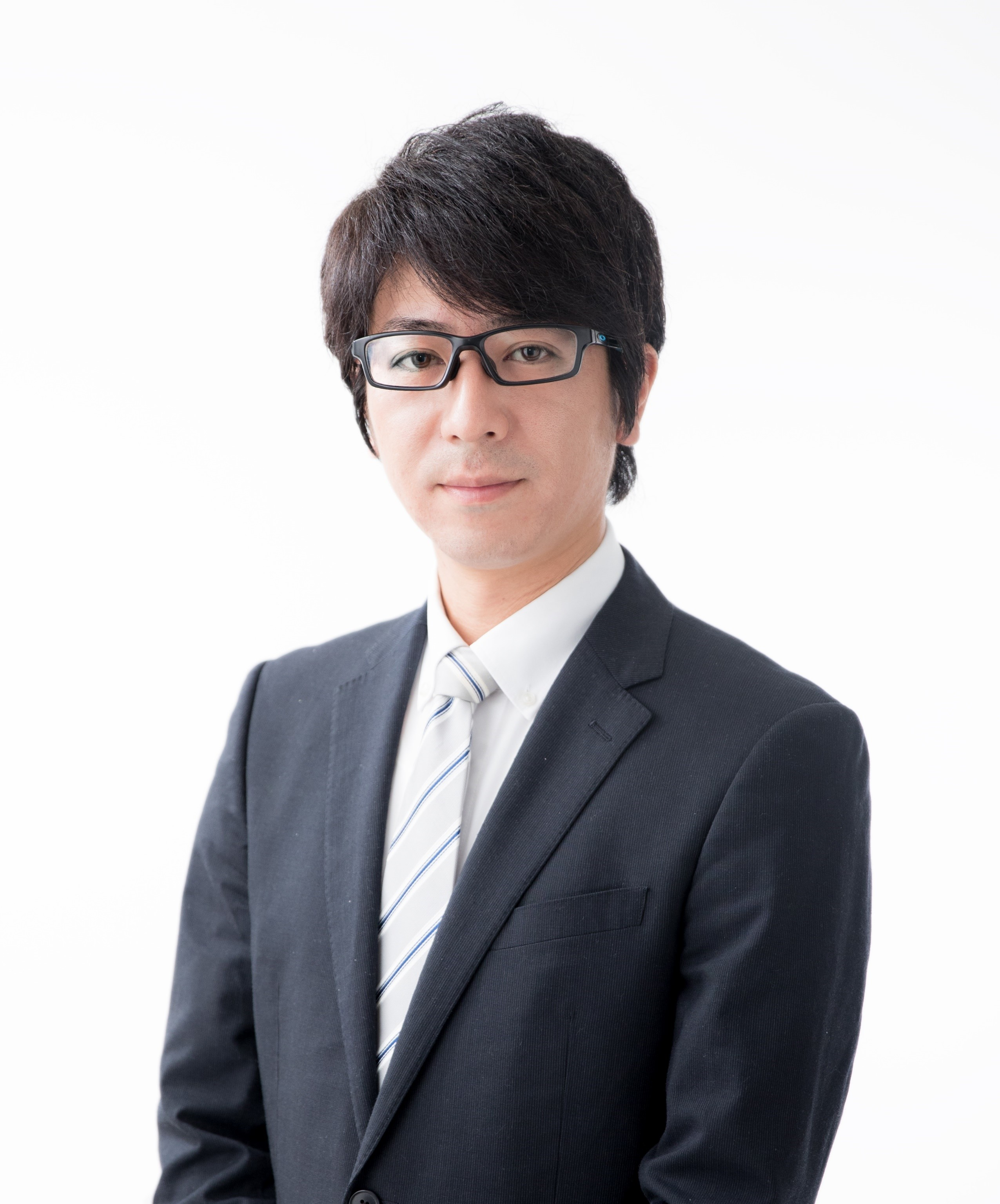 写真